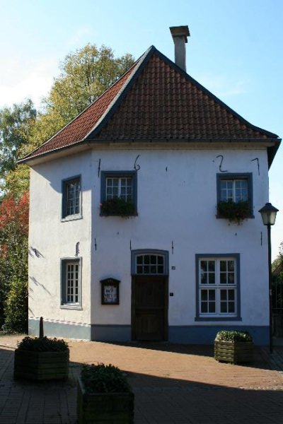 Denkmal Nr. 69 in Schwalmtal-Waldniel